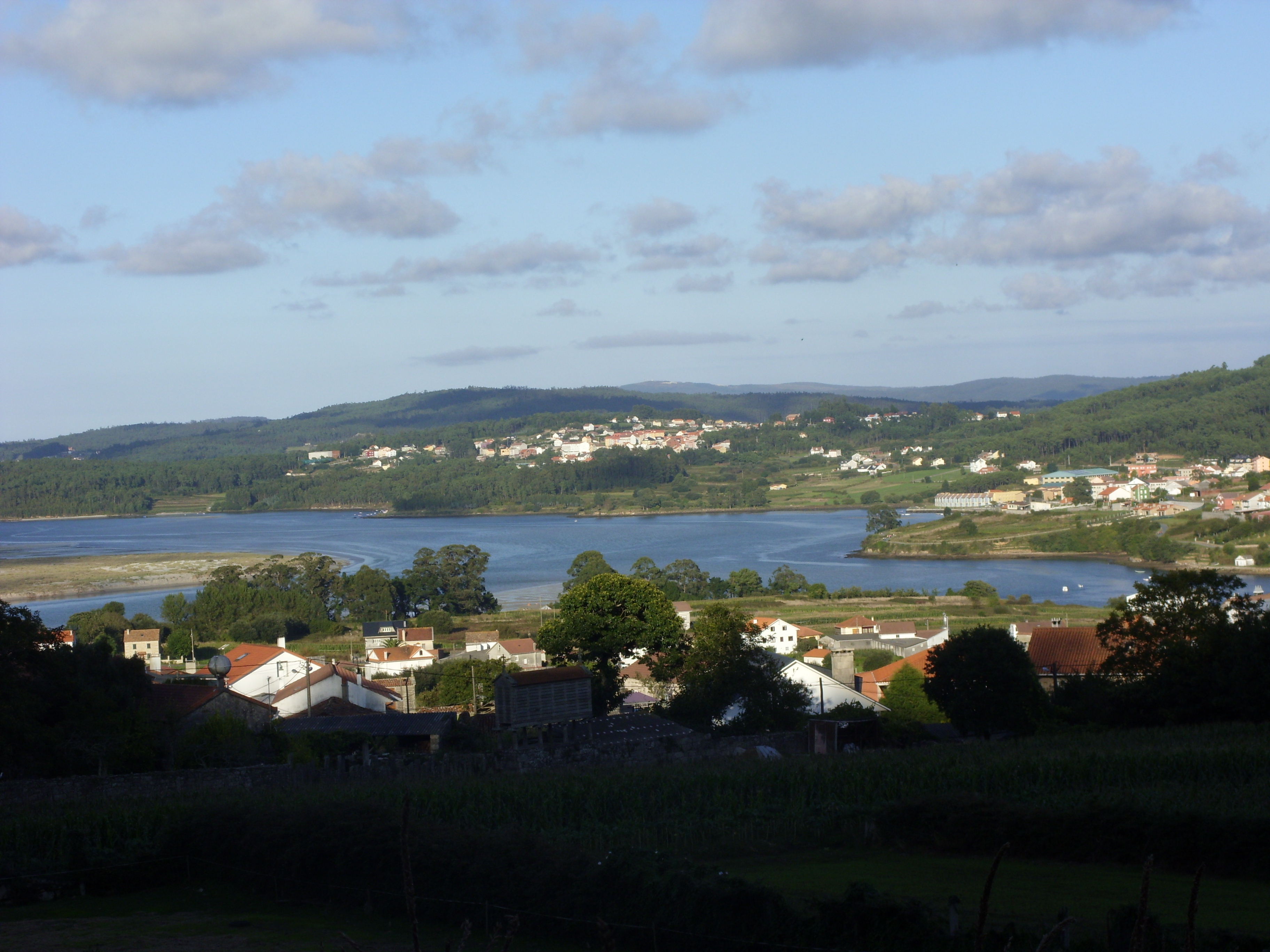 Vista de canduas dende Semonte